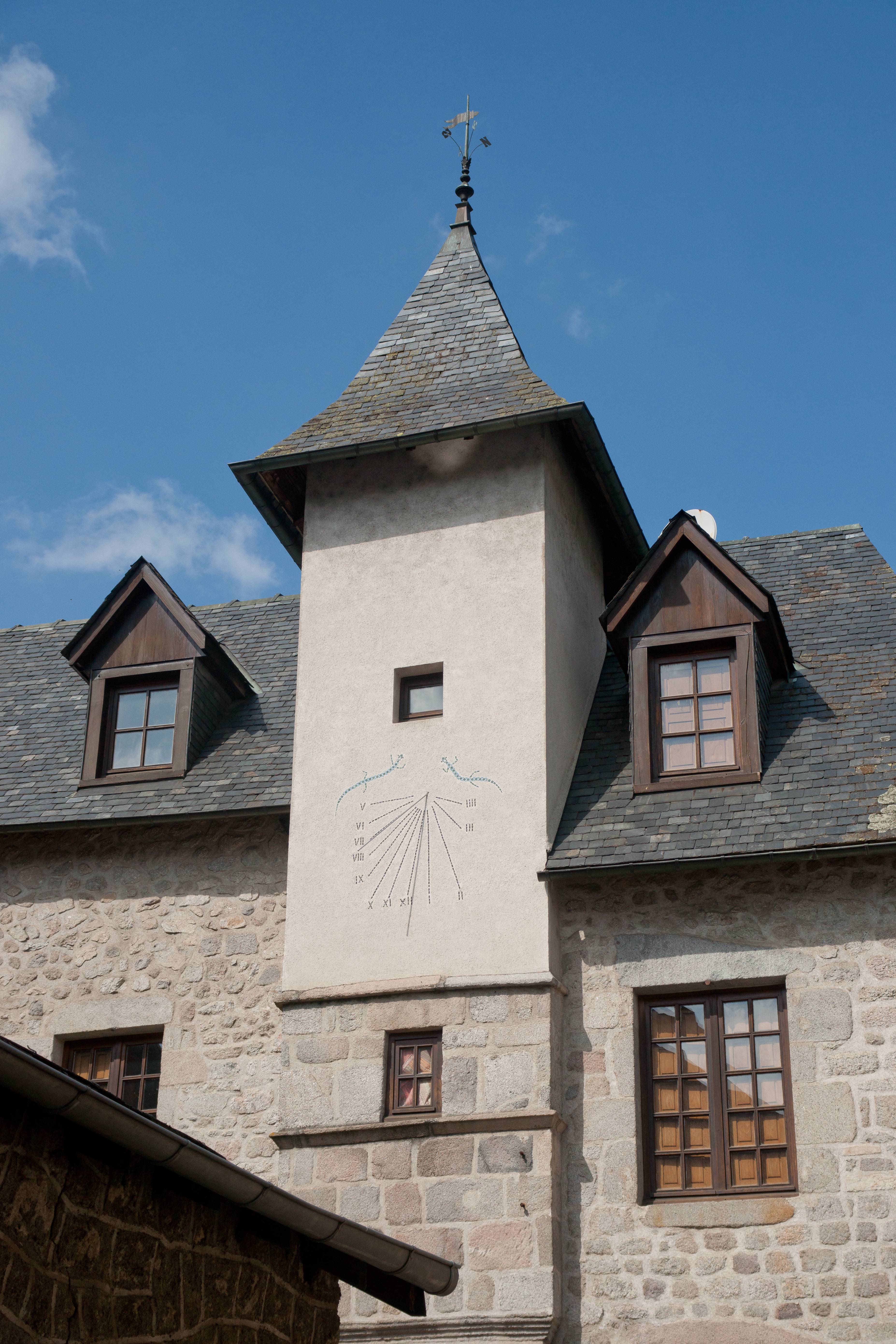 Vieille ville de Ussel en Corrèze. Cadran solaire.